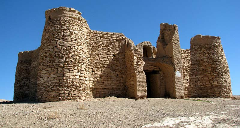 قلعه سفید ندوشن یزد